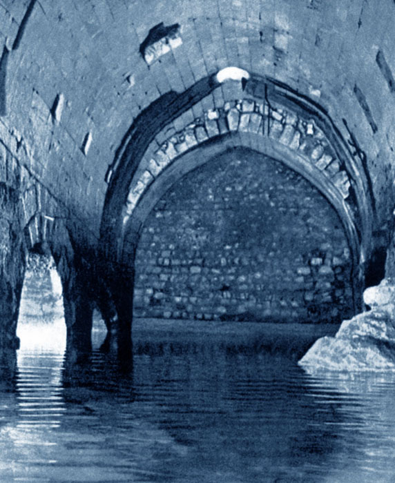 בריכת הסטרותיון